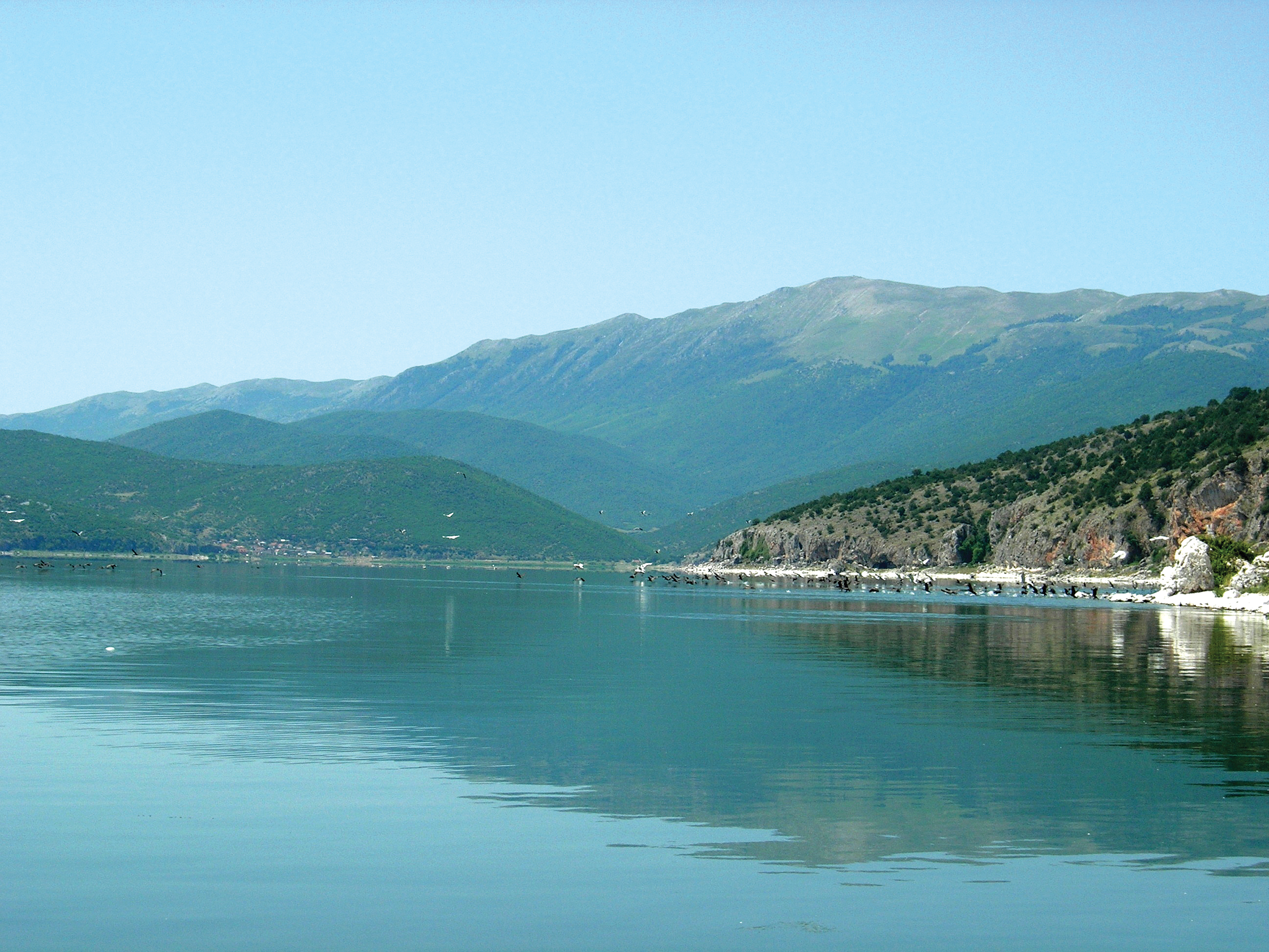 Lake Prespa, Macedonia